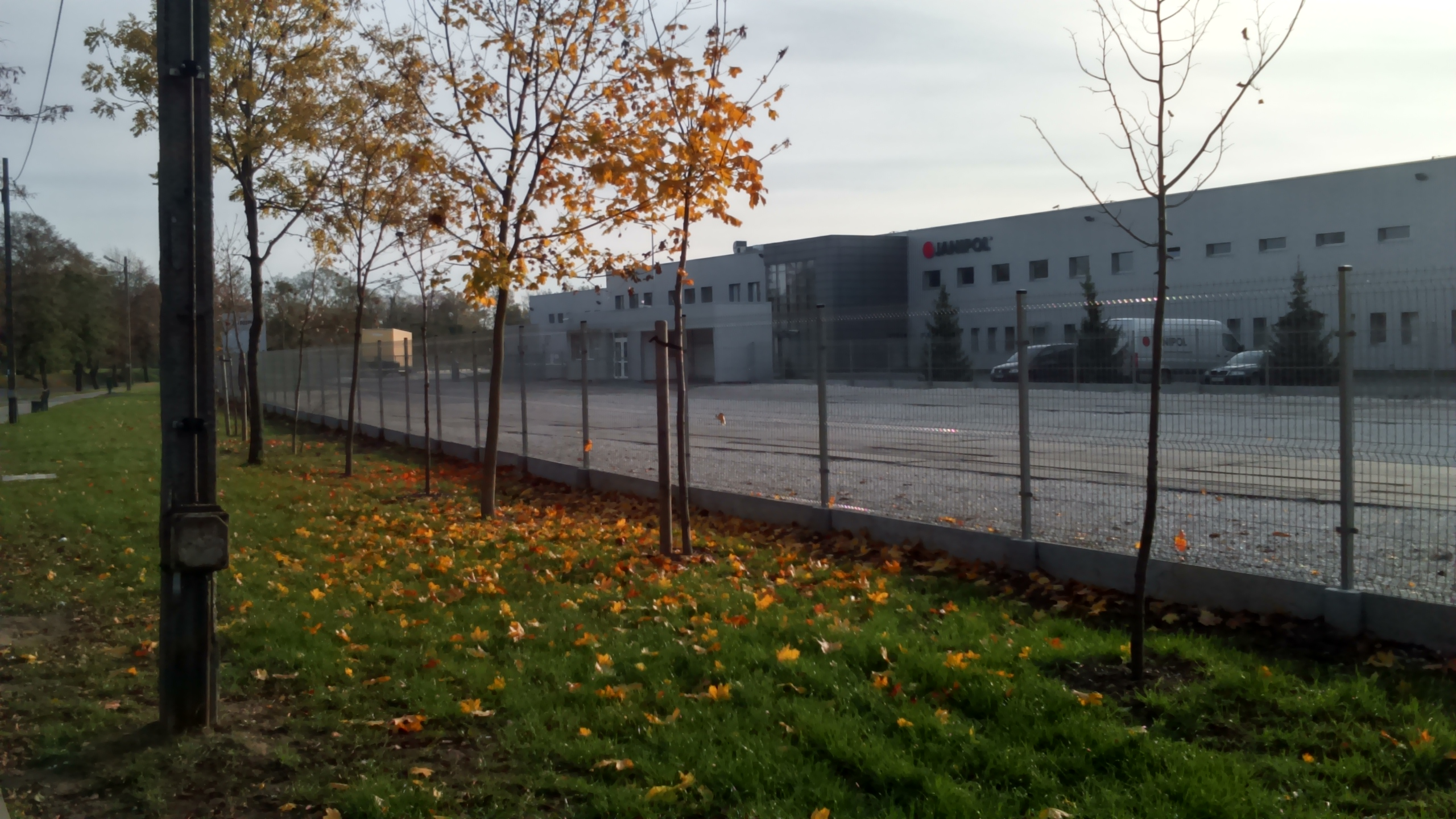 Janipol Janikowo